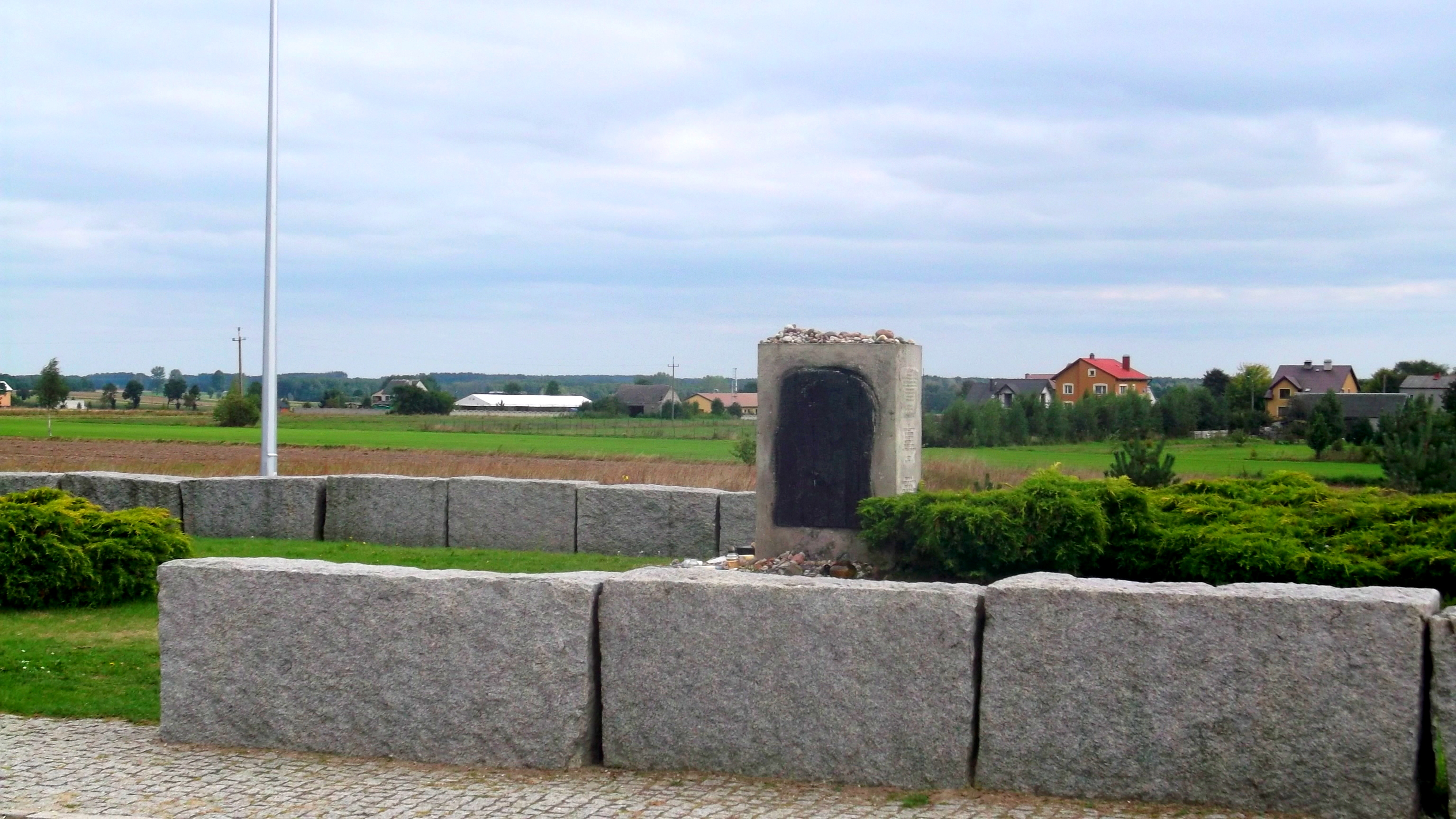 Pomnik upamiętniający męczeńską śmierć Żydów z Jedwabnego, zamordowanych 10 lipca 1941r. Zginęli w różny sposób, jednakże najbardziej poruszająca jest śmierć tych, którzy spłonęli w stodole, co symbolizują wmurowane z przodu pomnika nadpalone drzwi. Zarys stodoły wyznaczają ustawione wokół kamienne bloki. Na obelisku napis: Pamięci Żydów z Jedwabnego i okolic, mężczyzn, kobiet, dzieci, współgospodarzy tej ziemi, zamordowanych, żywcem spalonych w tym miejscu 10 lipca 1941 roku.